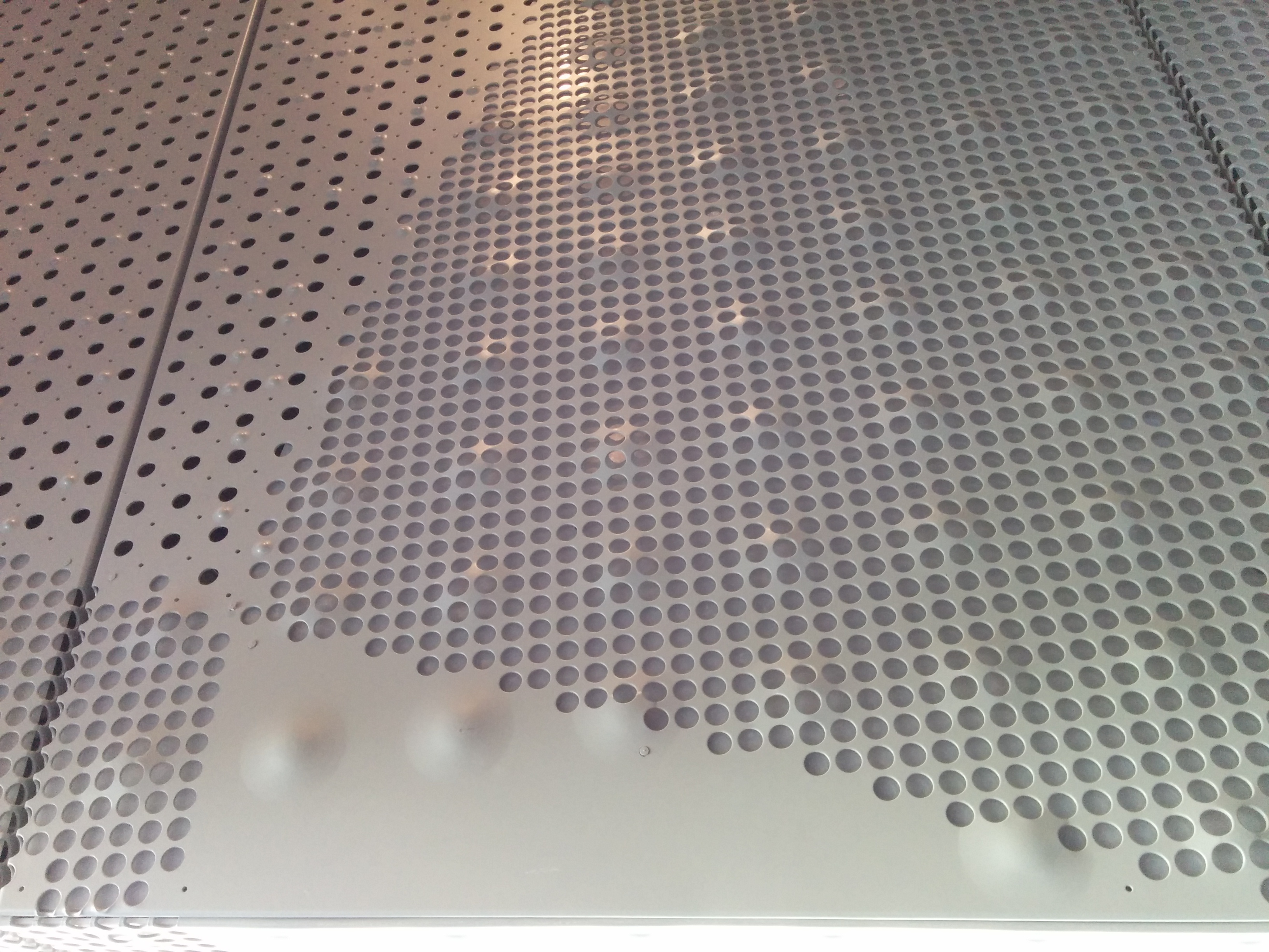 Edificio CaixaForum en la avenida José Anselmo Clavé de Zaragoza.